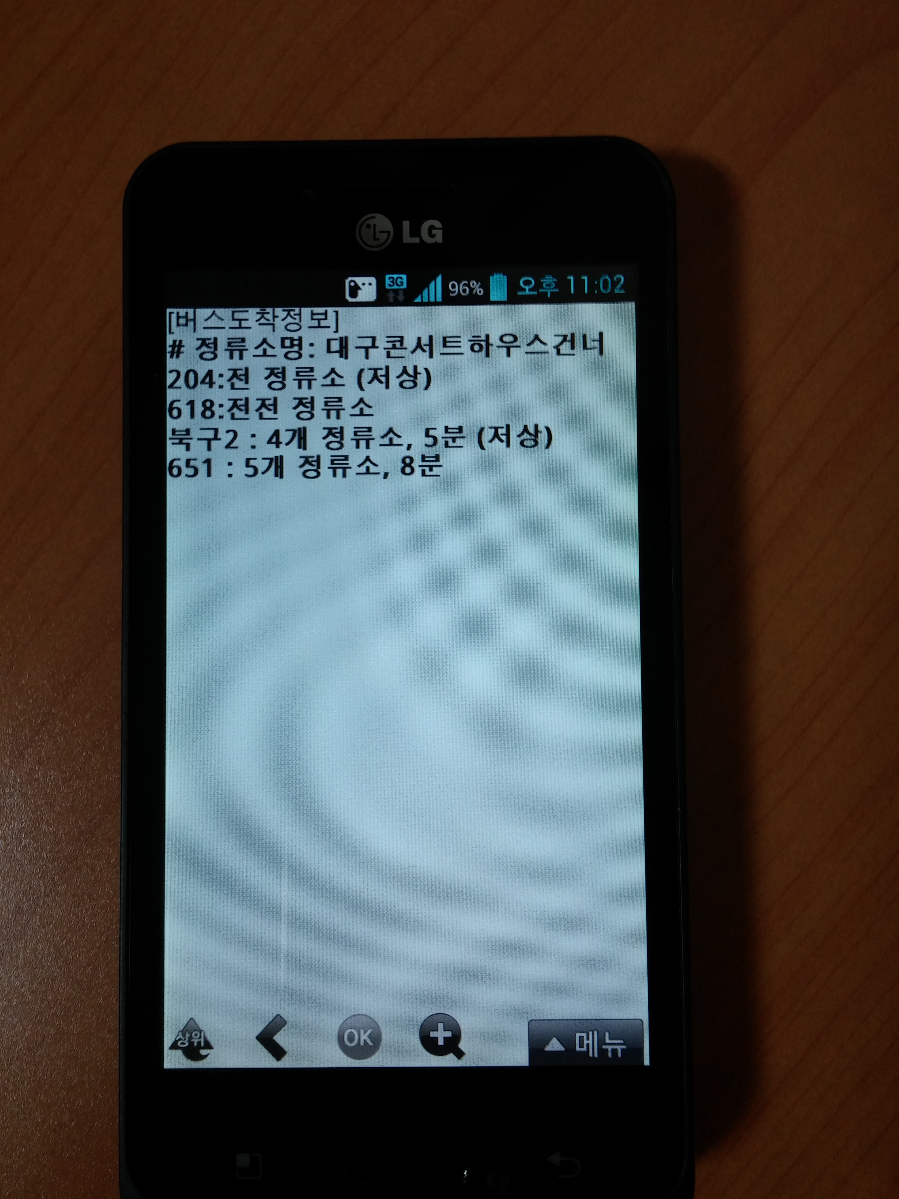 (대구 시내버스 안내방송 중) {3개 정류소} 란 표시를 볼 수 없습니다.